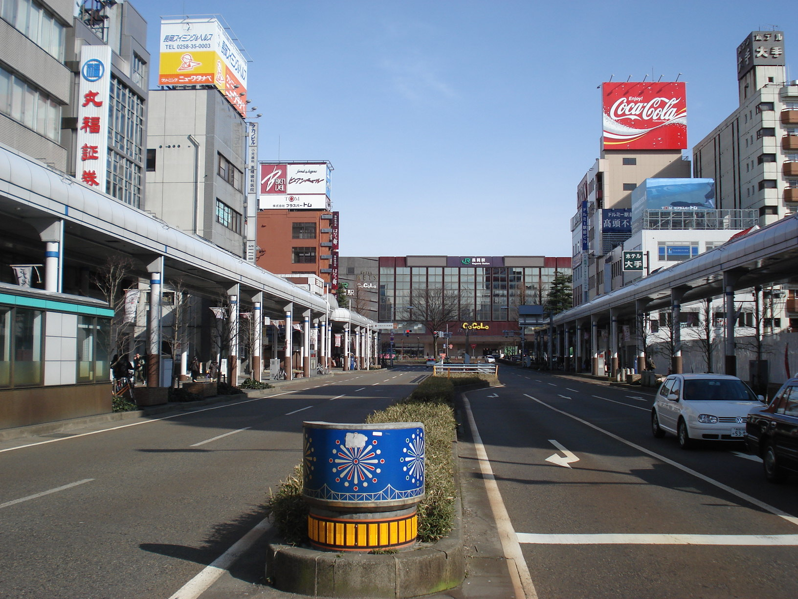 新潟県道36号 長岡停車場線 終点（大手通交差点）より起点方面を望む